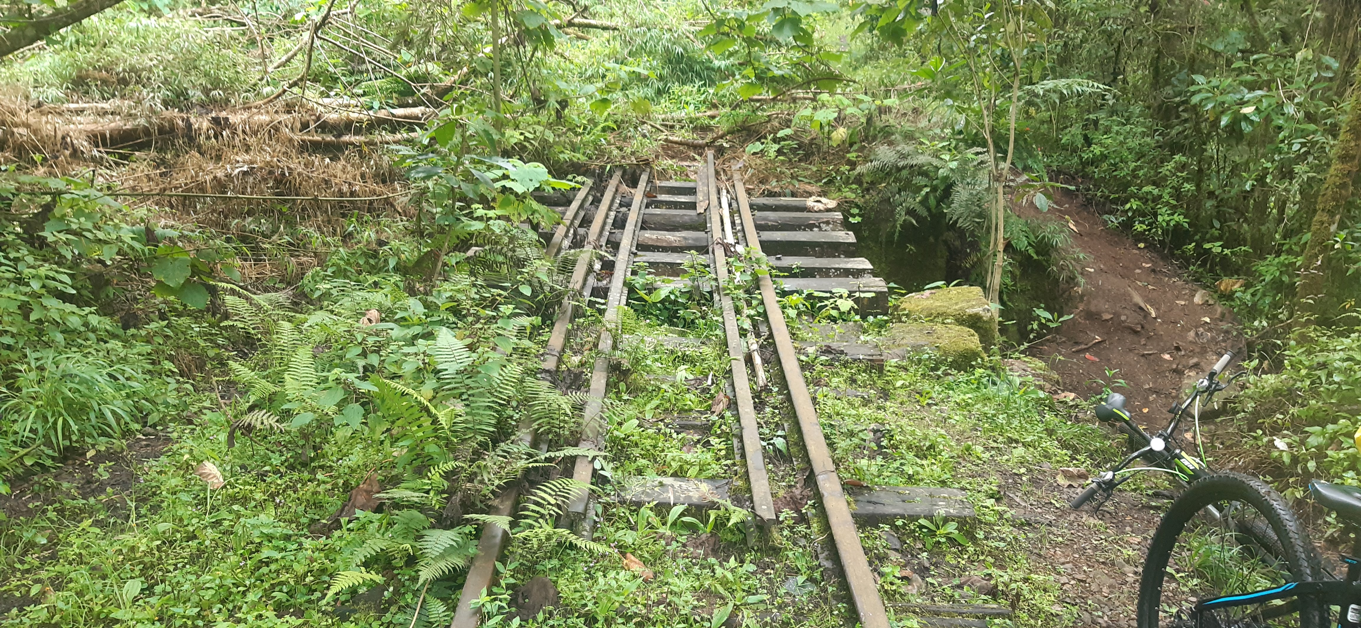 puente cerca del túnel en Zipacon